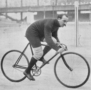 Henry Meyer, deutscher Radrennfahrer